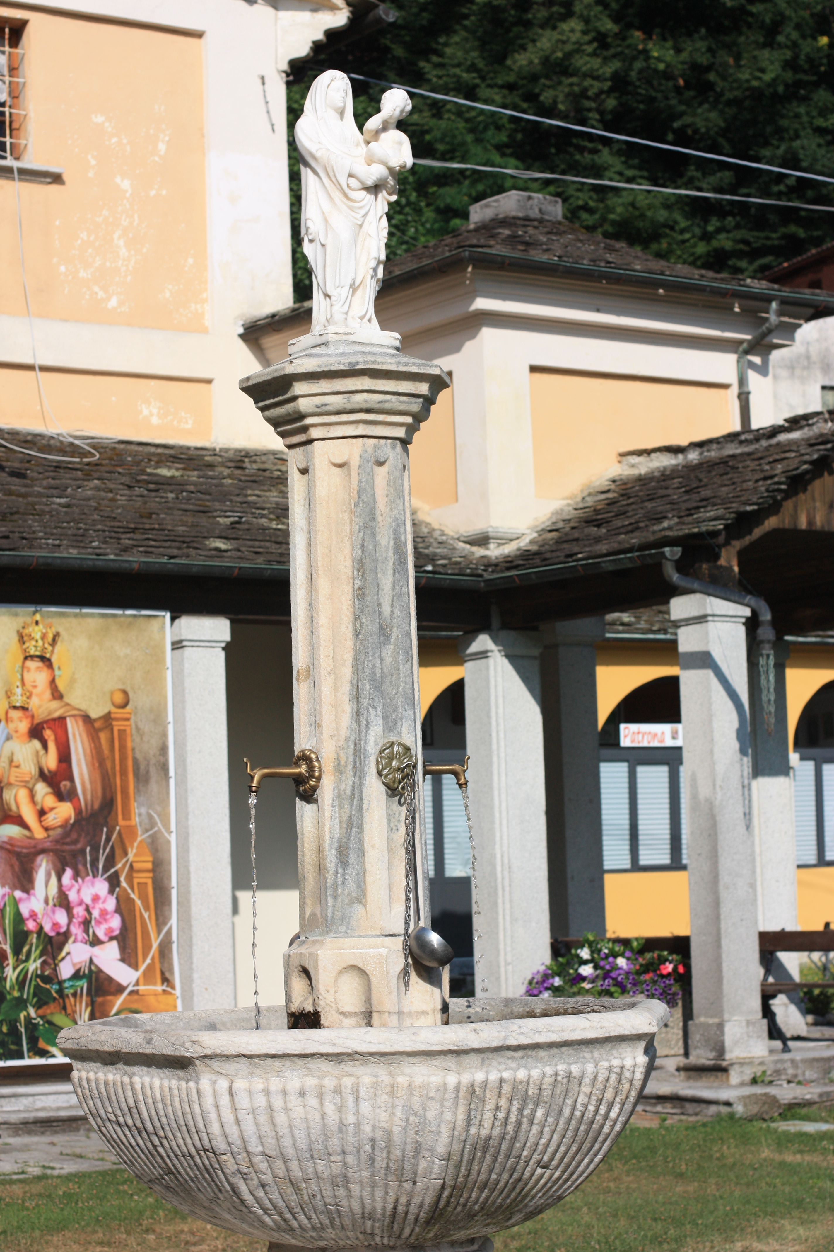 Santuario della Madonna del Boden a Ornavasso